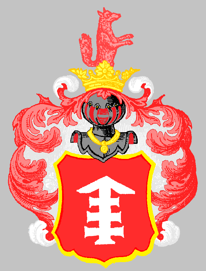 Герб "Лис"